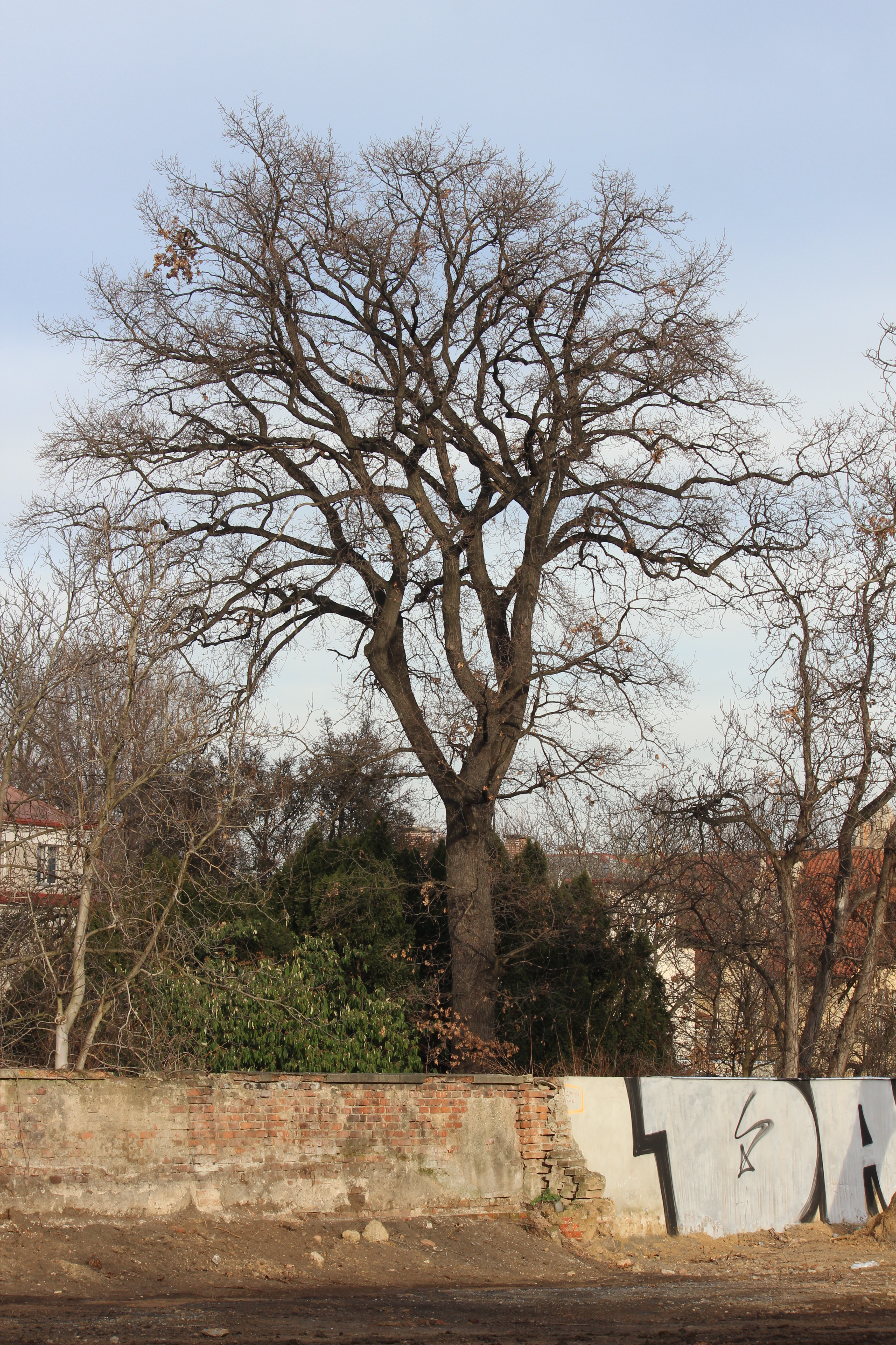 Památný dub č. 105657, v zahradě Suchardovy vily, Slavíčkova 151/15, Praha 6-Bubeneč 6